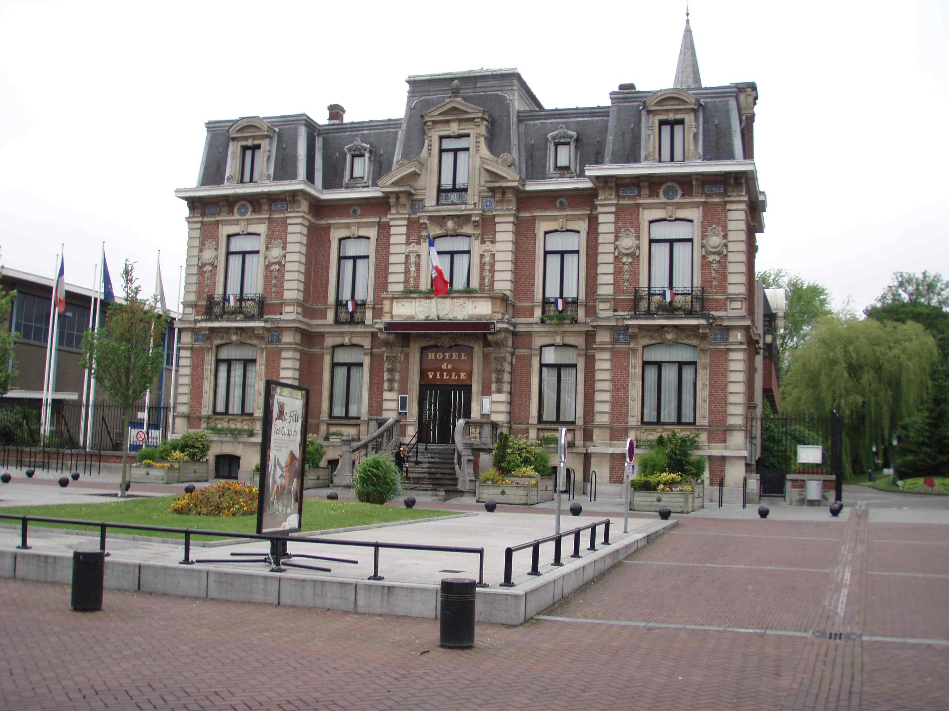 Mairie de Marquette-lez-Lille, Nord, France